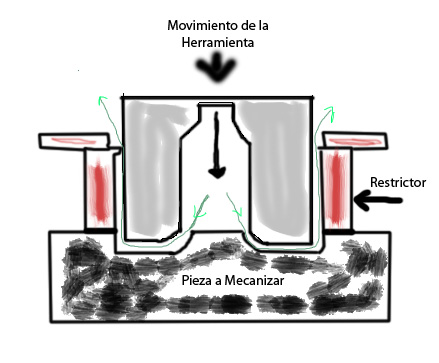 crokis de makina eletroquimica